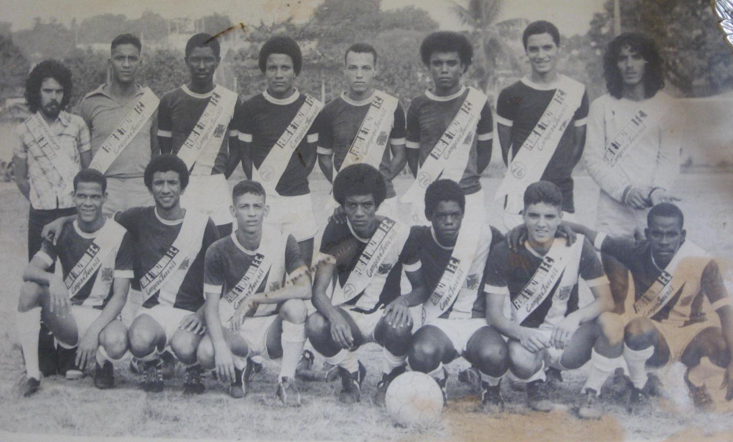 Equipe campeã Juvenil invicta do Tomazinho Futebol Clube, em 1976, da Liga de Desportos de São João de Meriti.